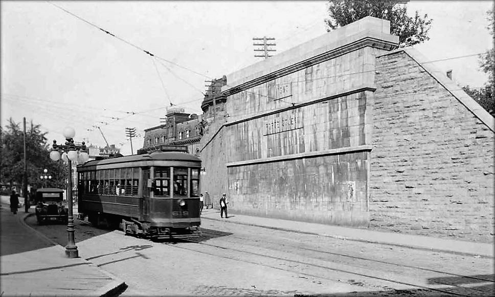 Vue éloignée du passage d'un tramway près de la porte Saint-Jean, vers 1930 « Sur le trajet de la Haute-Ville, les voitures tirées par deux chevaux s'accommodaient assez bien de la présence de la porte Saint-Jean, qui était pourvue de deux grands passages arqués. En 1897, lorsque le tramway est électrifié et que des fils aériens doivent être installés, la porte Saint-Jean devient un obstacle infranchissable. Elle sera donc démolie. Ce n'est qu'en 1939 que l'actuelle porte, avec sa grande arche, sera construite. »